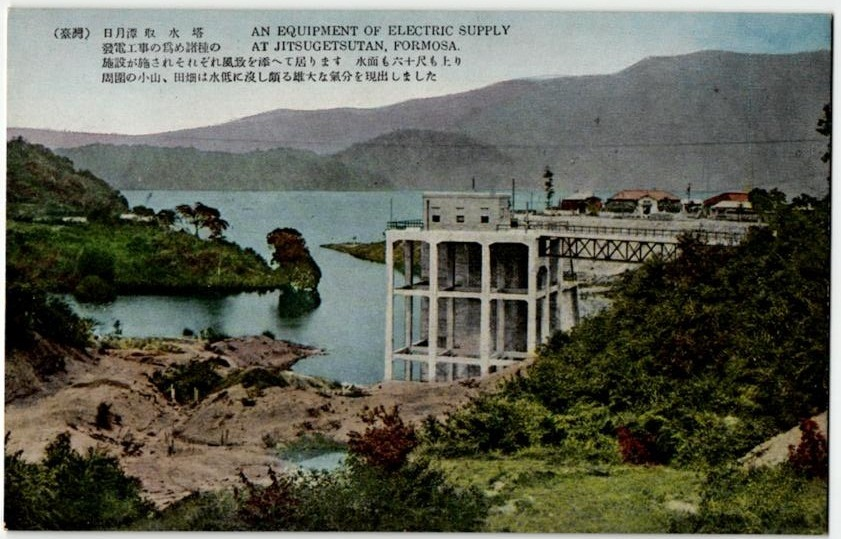 日月潭水力發電工程明信片 明信片上有說明文字：「為了發電工程而在週邊設置了各種設施，也增添了一些風致。水面也上升達六十尺，附近的小山、田野都被淹沒在水中，頗能顯出雄偉的氣氛」。